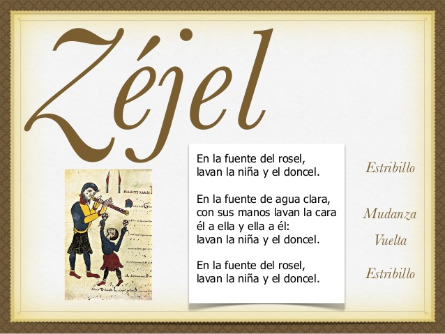 Zéjel